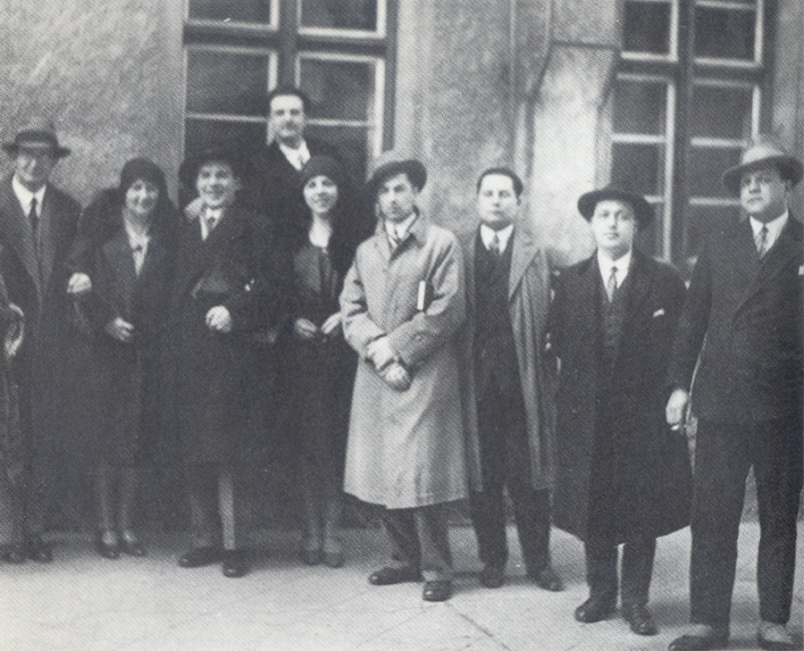 Karajan in Ulm